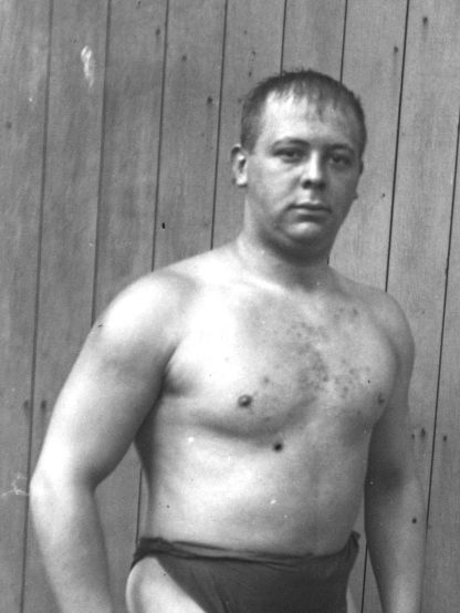 Zachár Imre (Budapest, 1890. május 11. – Budapest, 1954. április 7.) olimpiai ezüstérmes úszó, vízilabdázó, banktisztviselő, a Magyar Jelzáloghitel Bank egykori igazgatója.